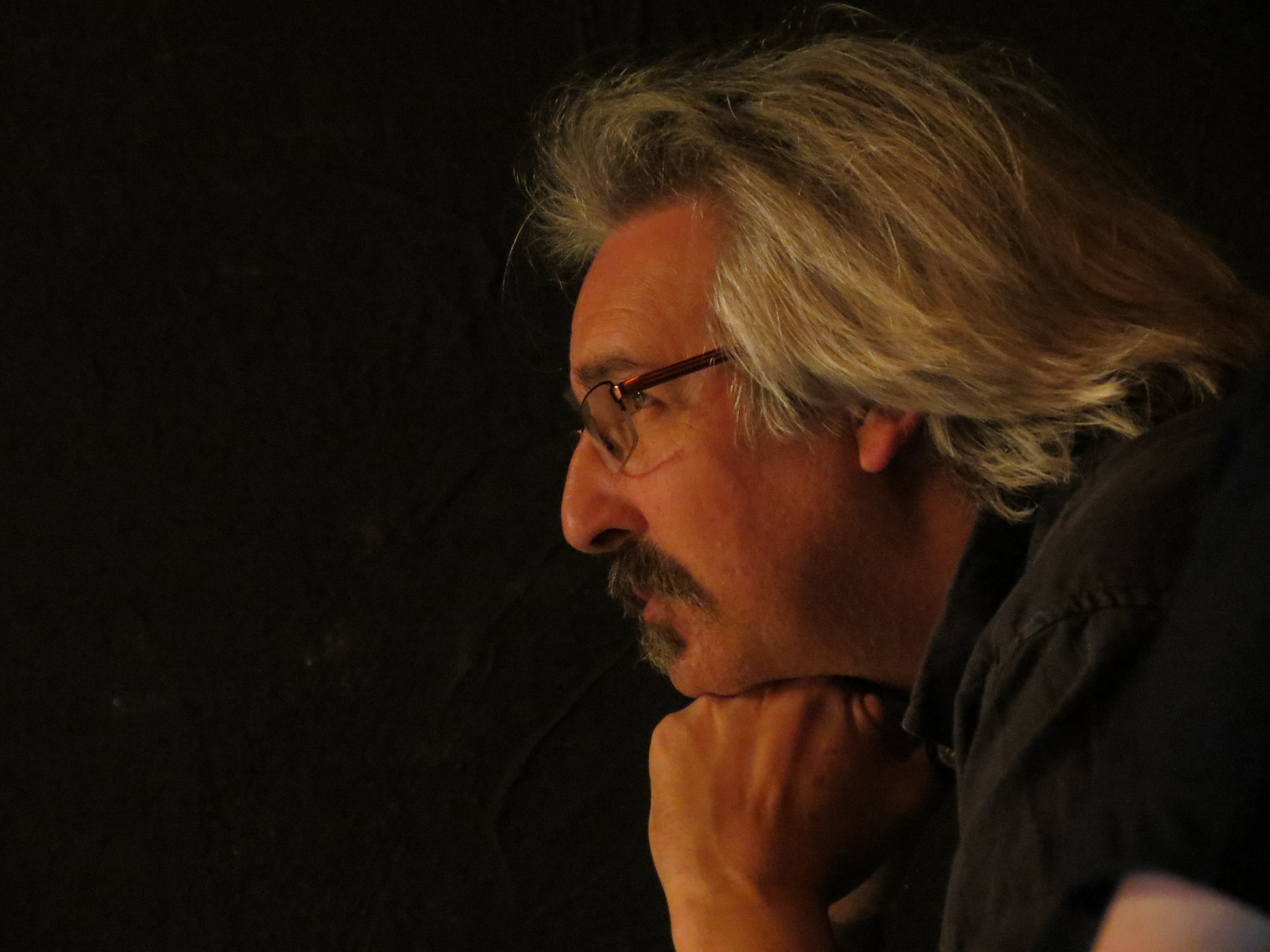 Matthias Theodor Vogt, Görlitz, Festival Natur trifft Musik II, Mai 2012